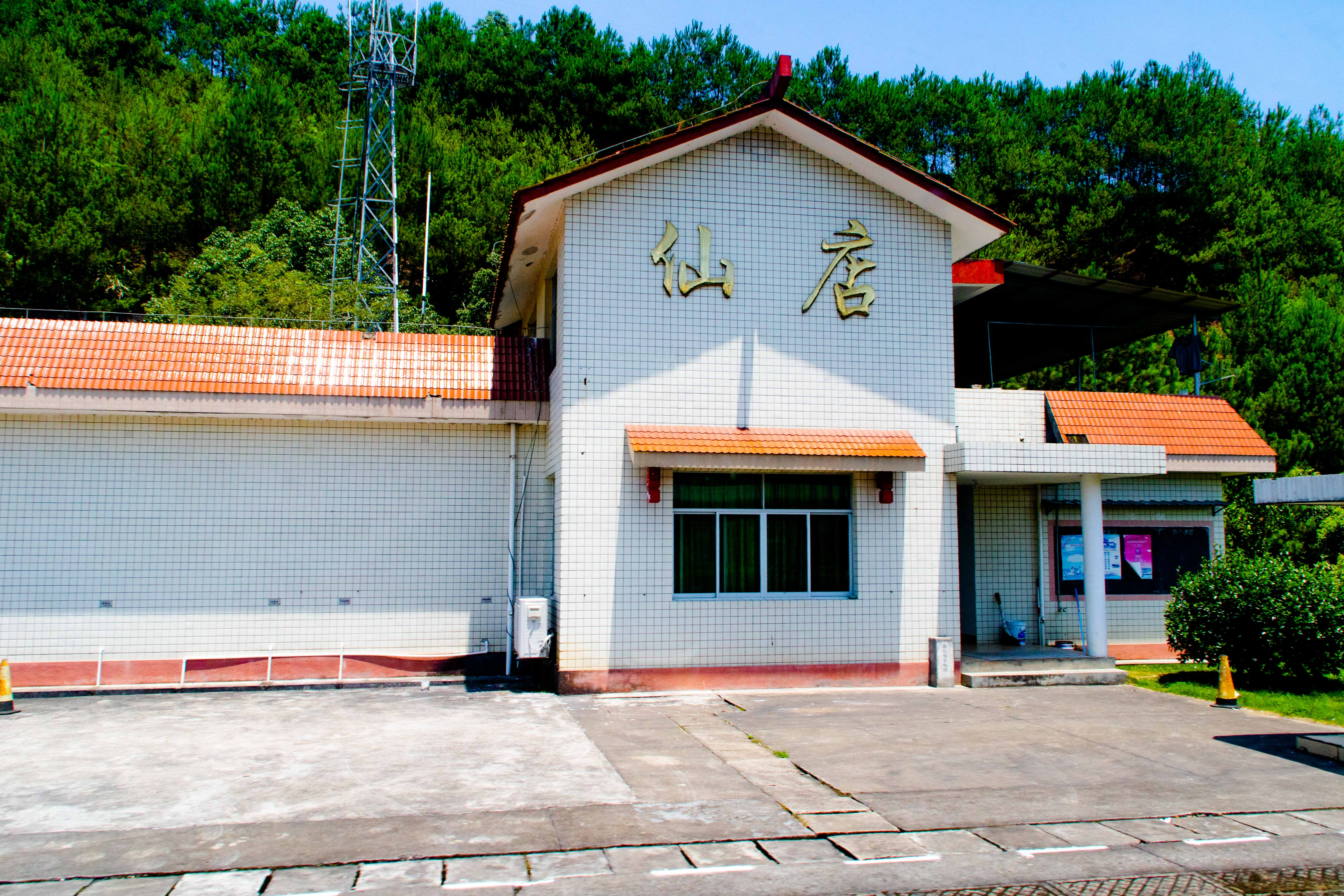 仙店站站房